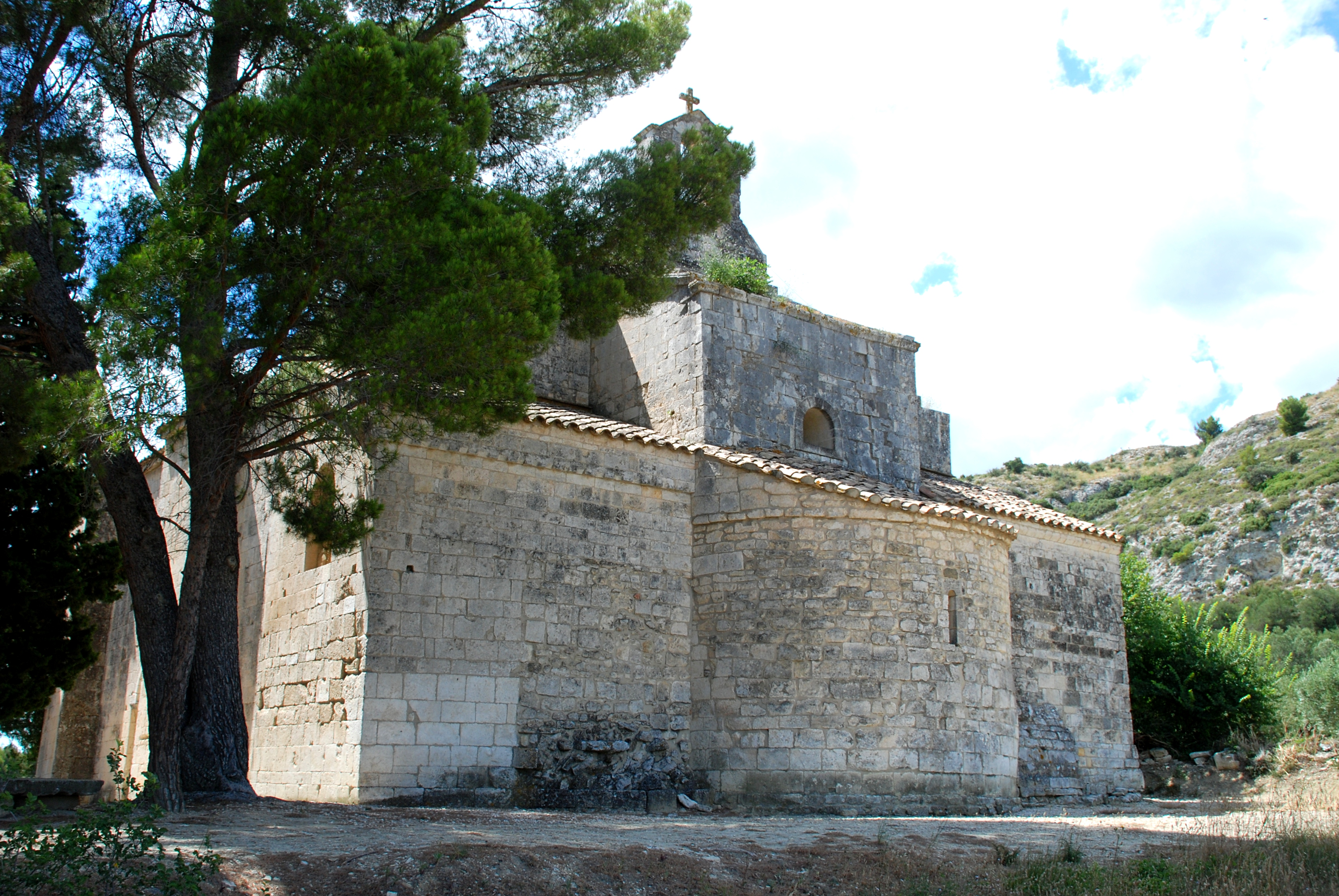 France - Provence - Chapelle Saint-Amand de Théziers